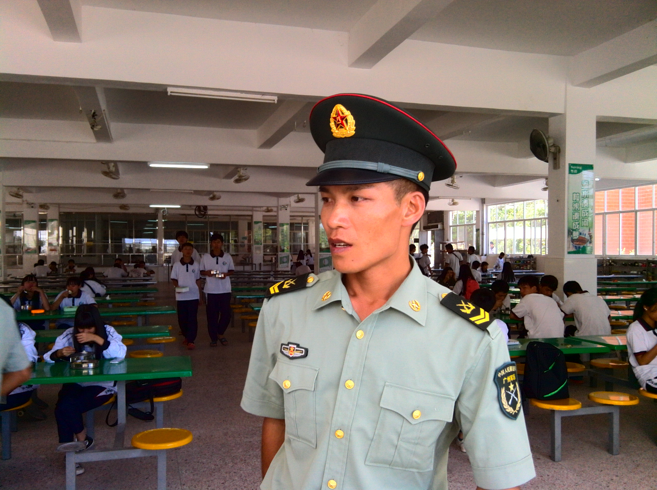 一位参加潮州市职业技术学校2014年新生军训的总教官，四级军士长。